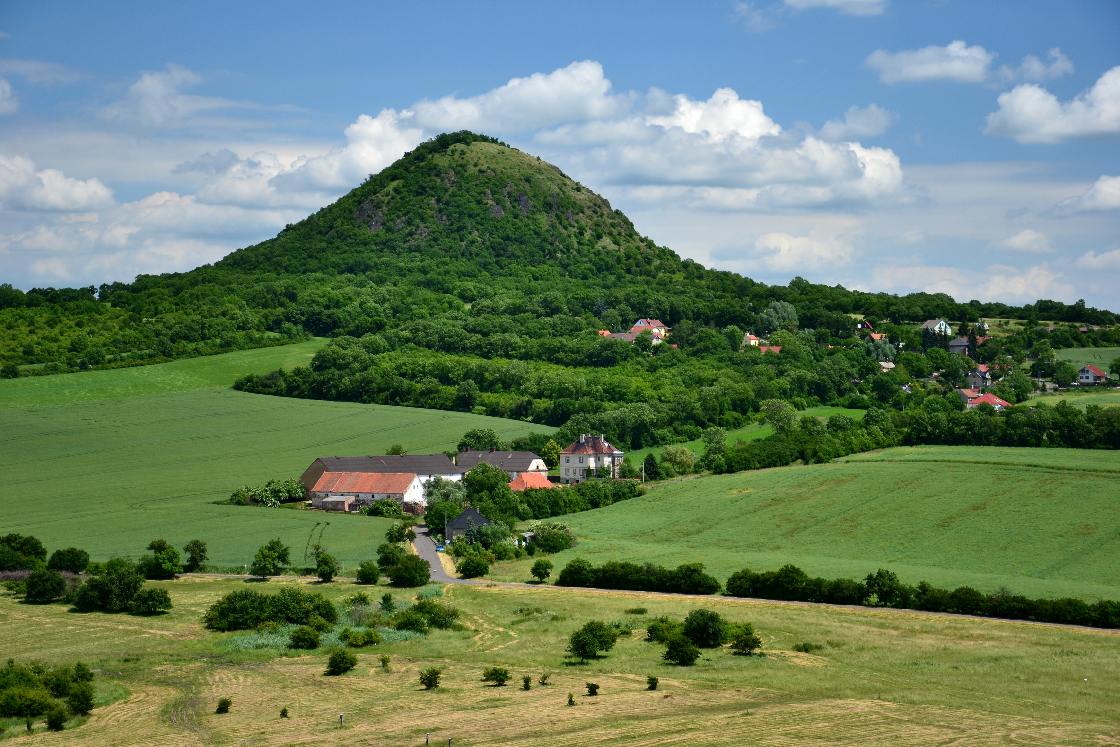 Vrch a osada Milá z Písečného vrchu